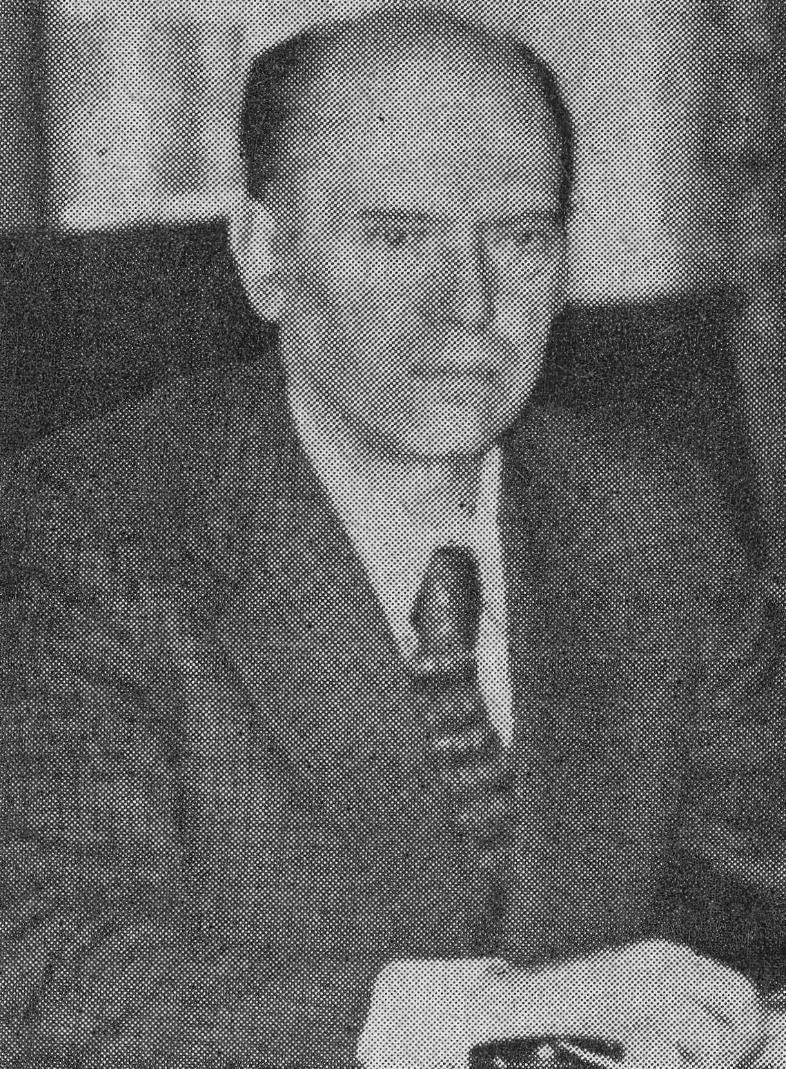 Prof. dr Andrzej Zahorski